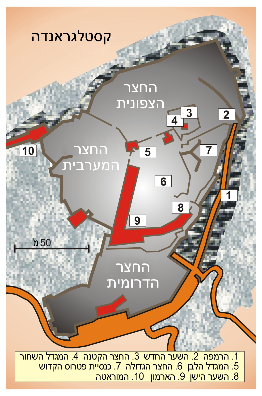 Plan des Castello Grande in Bellinzona, Tessin, Schweiz